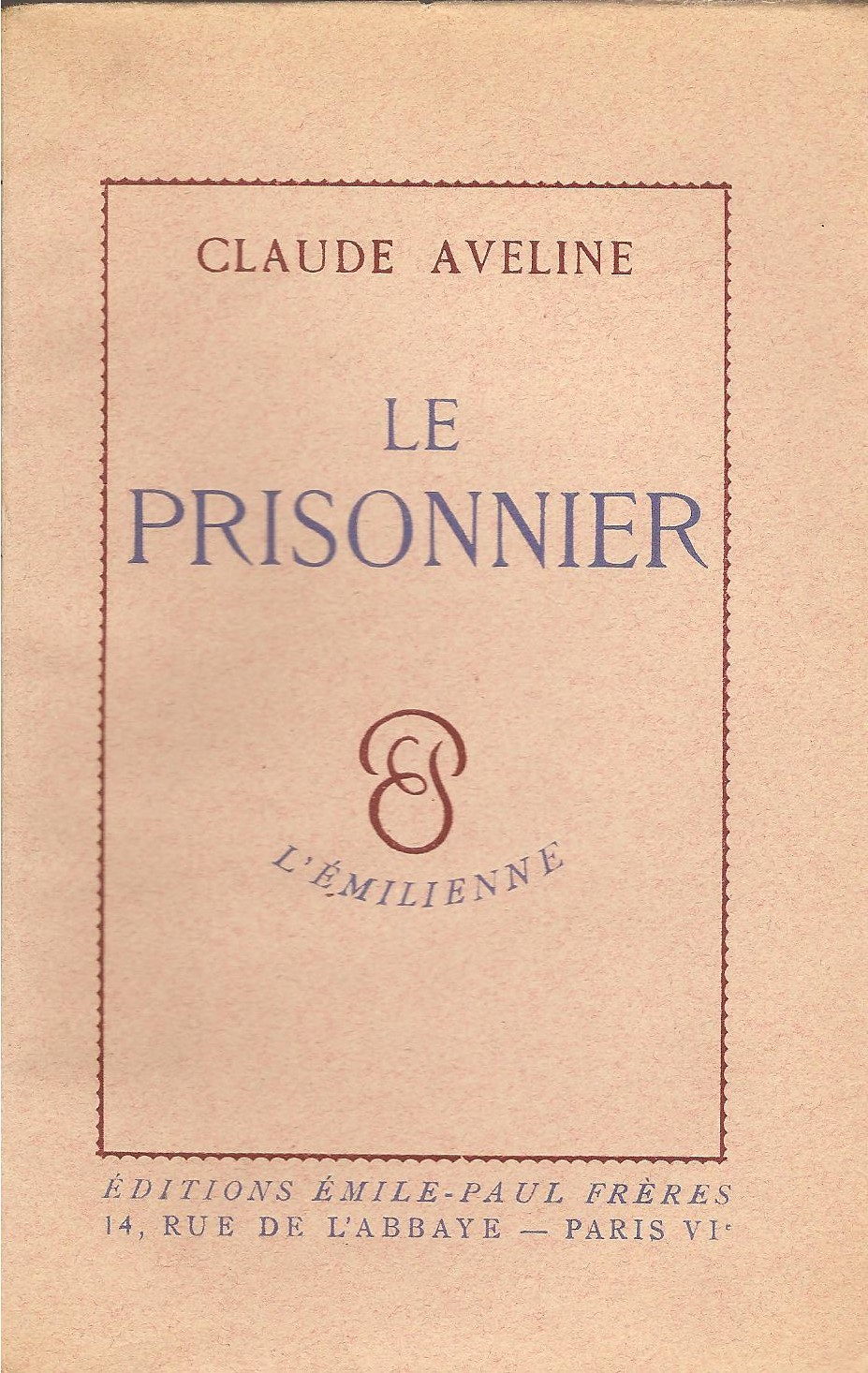 Couverture de "Le Prisonnier" de Claude Aveline, 1936